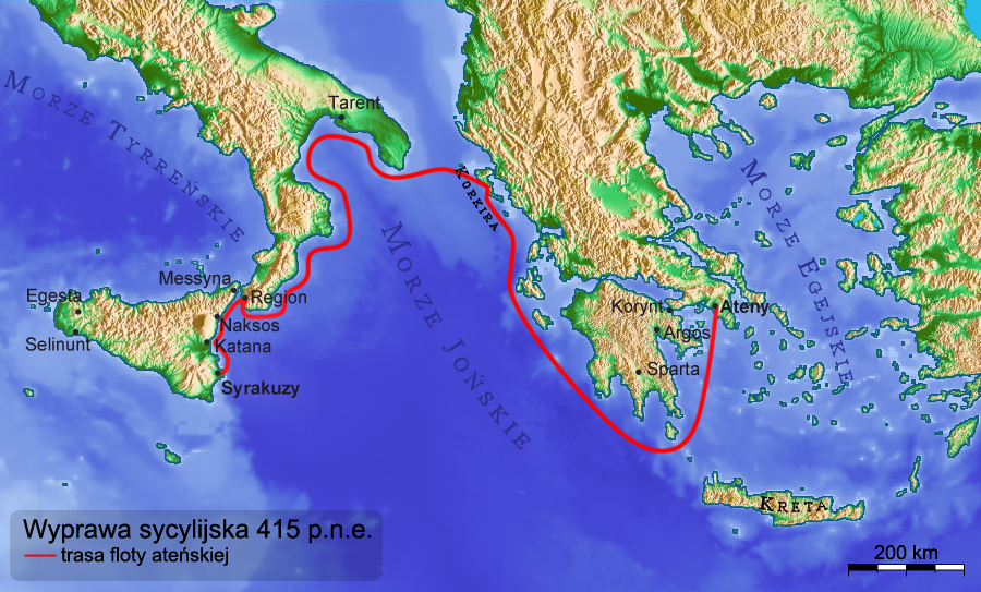 Trasa floty ateńskiej podczas wyprawy sycylijskiej 415 p.n.e. Nazwy miejscowości za książką Wojna peloponeska (Czytelnik 2003). Topografia na podstawie danych: GLOBE ETOPO2 Bibliografia Wojna peloponeska, Tukidydes, Czytelnik 2003 The Peloponesian War, Donald Kagan, HarperCollinsPublishers 2003